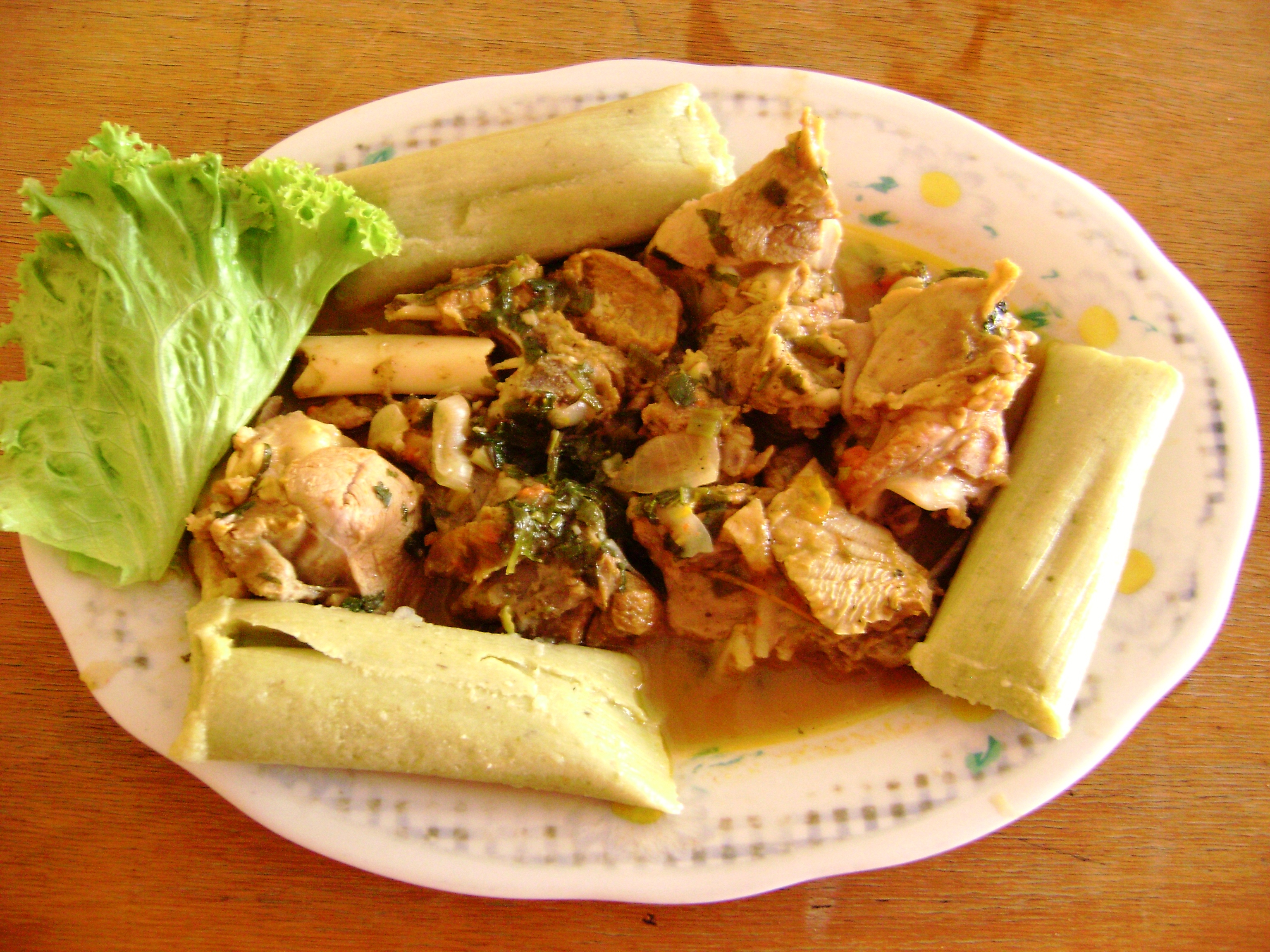 Cabrito con tamales. Piura, Perú.